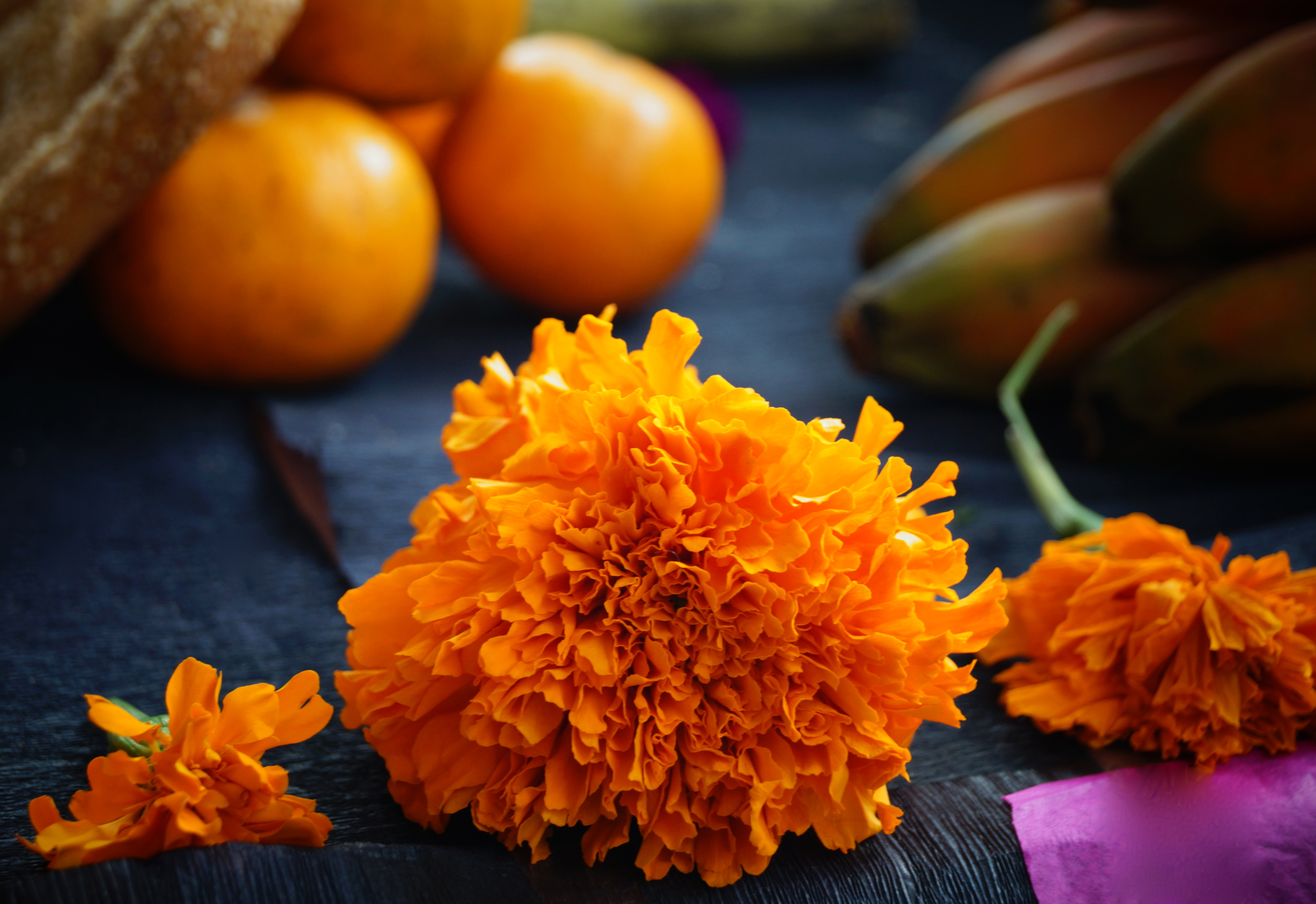 Flor de cempazúchitl